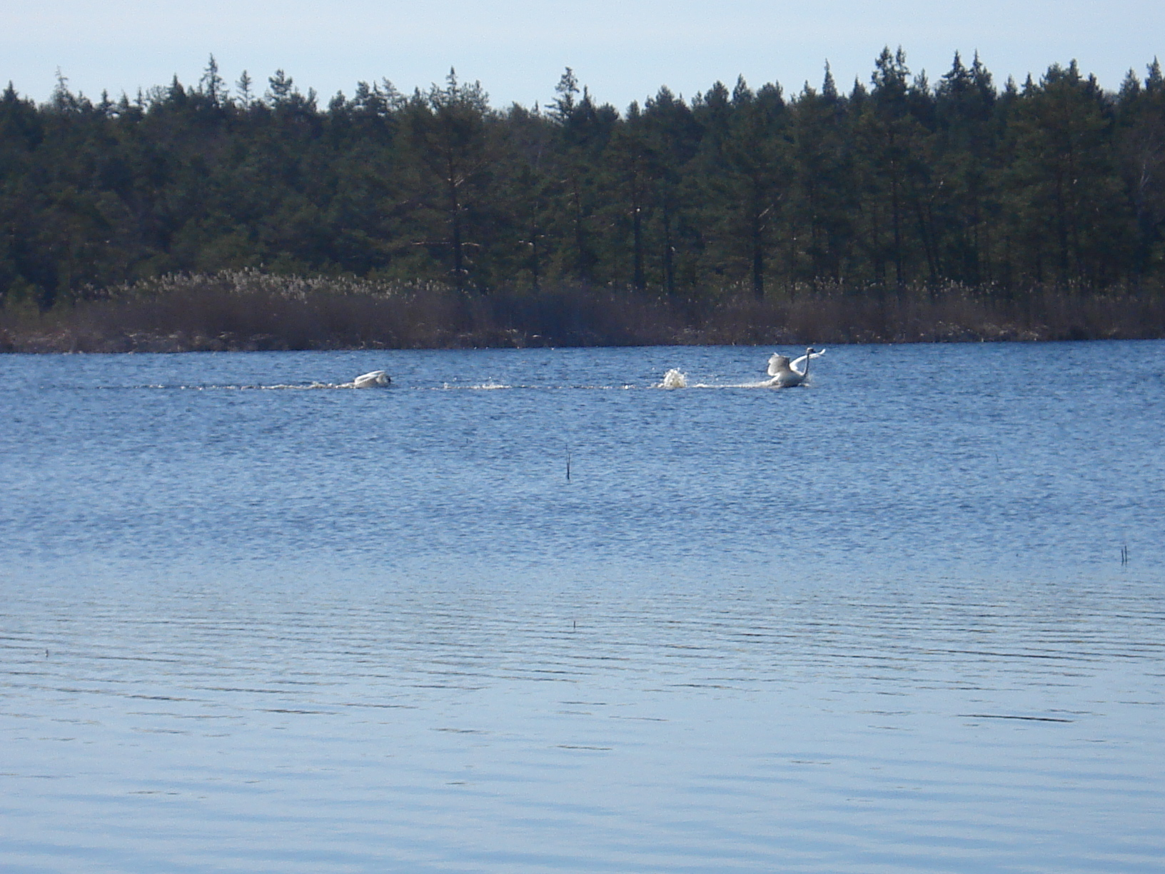 Gulbji Kugrainī